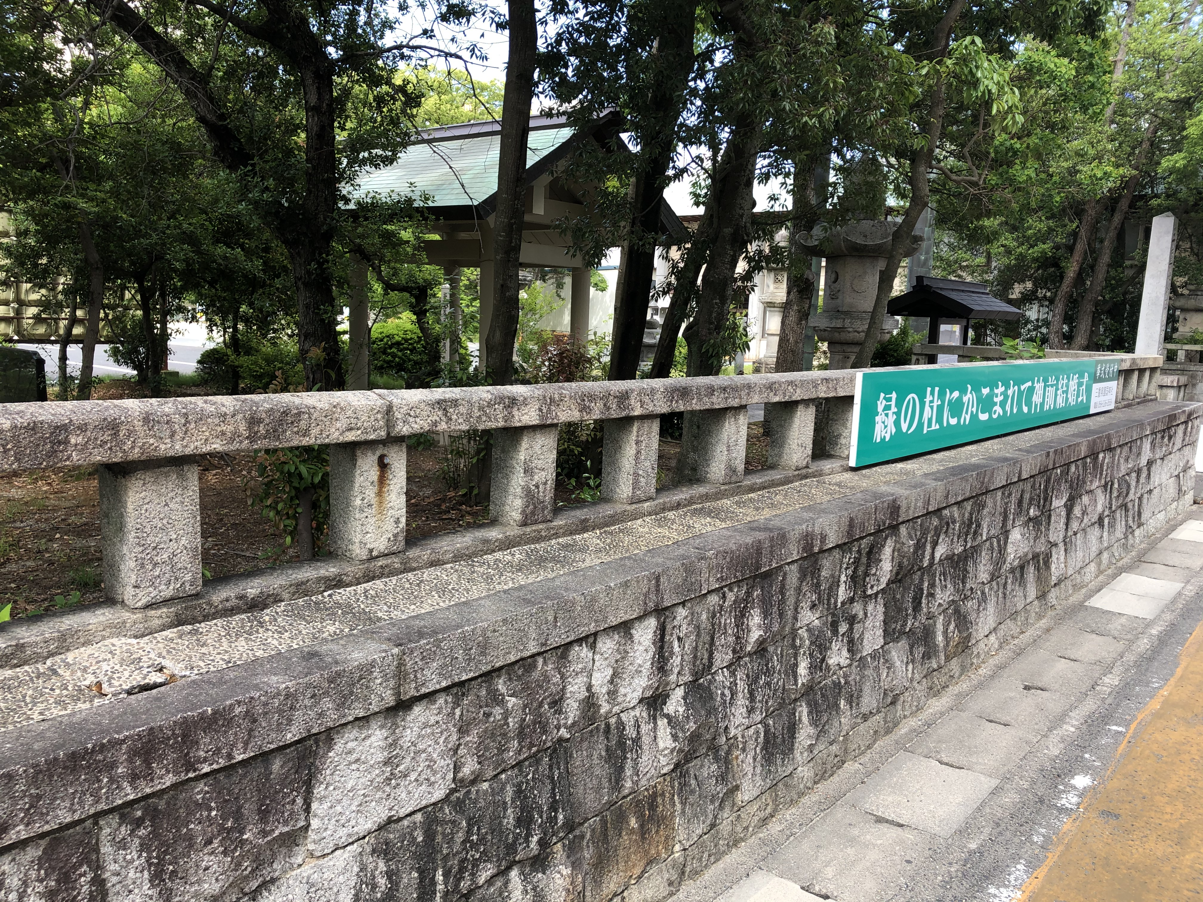 三重県護国神社石玉垣